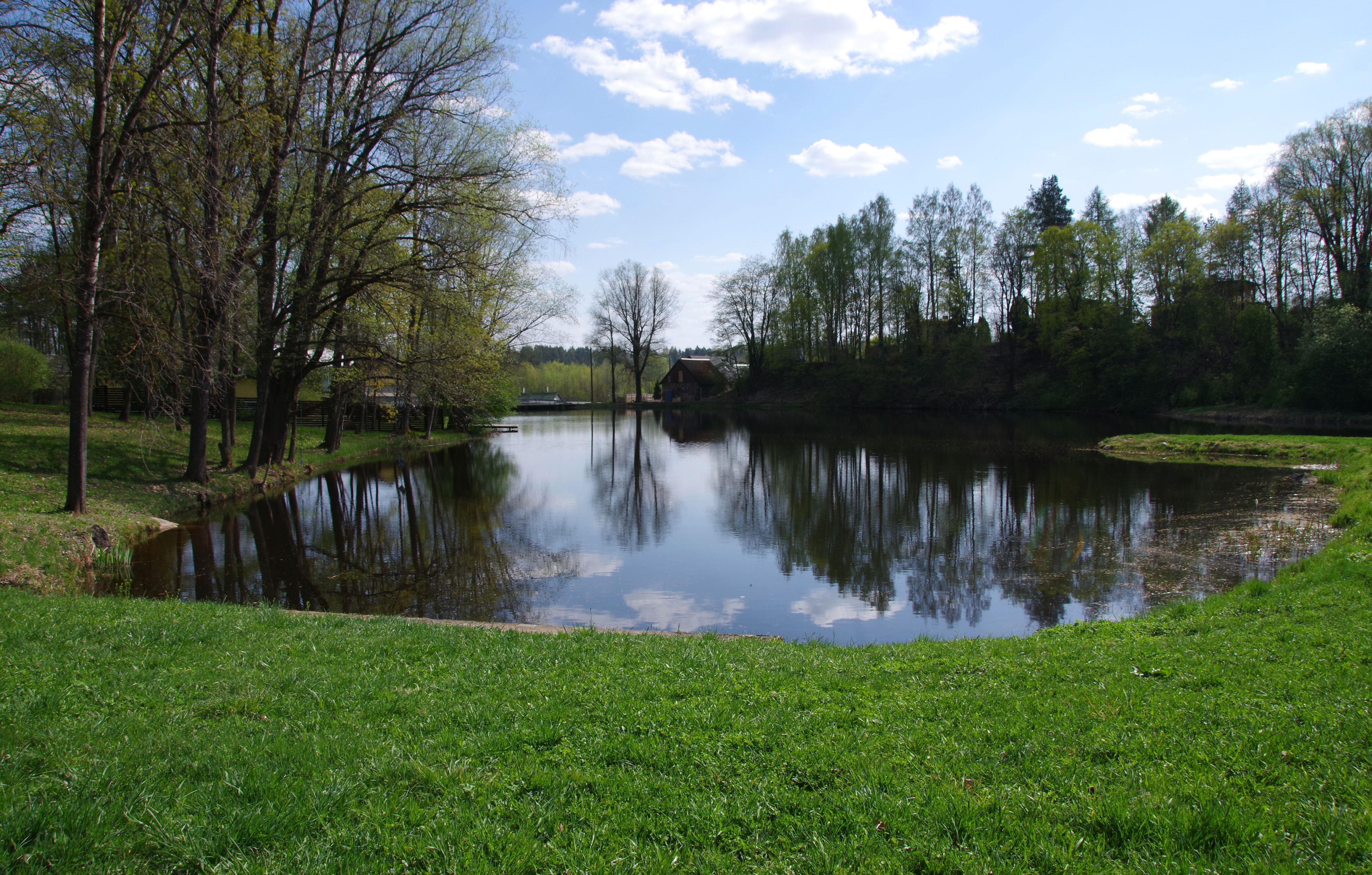 Kösti järv (ka Kösti paisjärv, Kösti Veskijärv ja Kõsti veskijärv) on paisjärv Sakala kõrgustiku põhjaosas, Viljandi linnas.